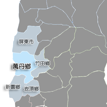 中文（台灣）: 屏東縣萬丹鄉相對位置。